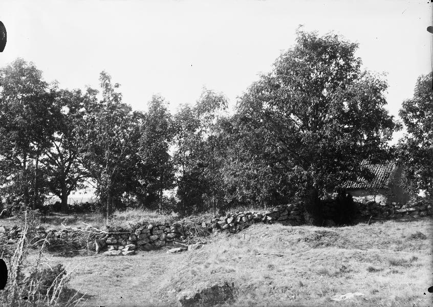 Kyrkplatsen. Kategori: (01) ExteriörerKyrkplatsen.